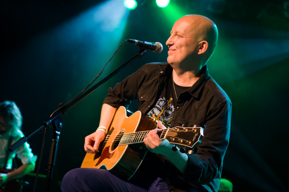 Koncert zespołu Piotr Bukartyk i Szałbydałci, 20 marca 2013, Klub Stodoła, Warszawa.